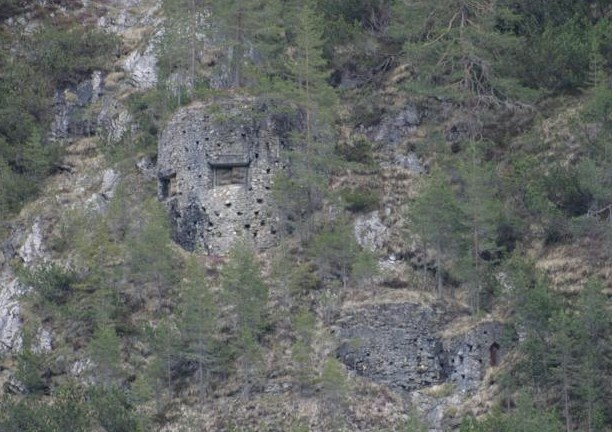 Torretta osservatorio e uscita di emergenza dell'opera 3, dello sbarramento Landro Nord